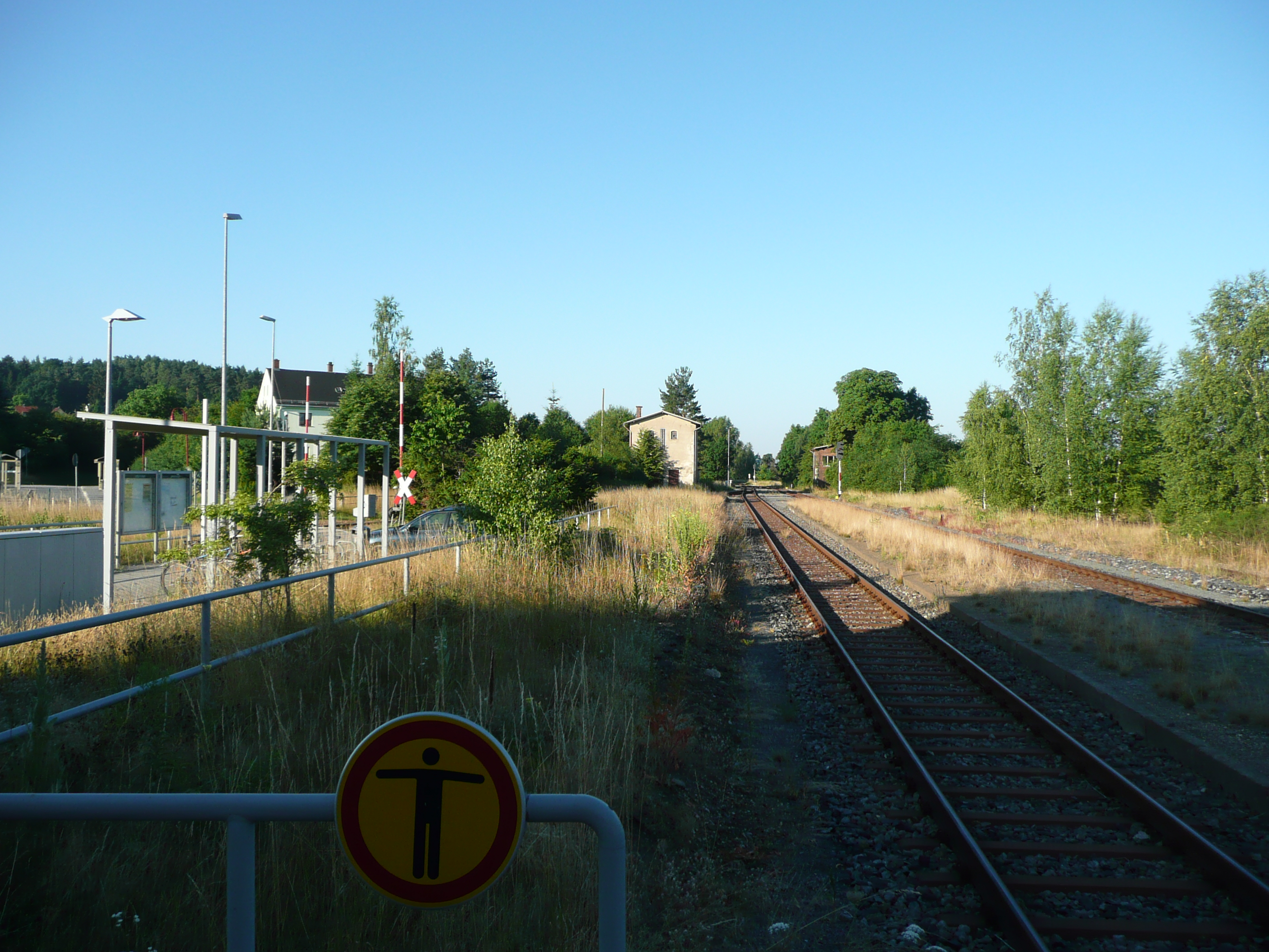 Dürröhrsdorf Westseite Richtung Pirna